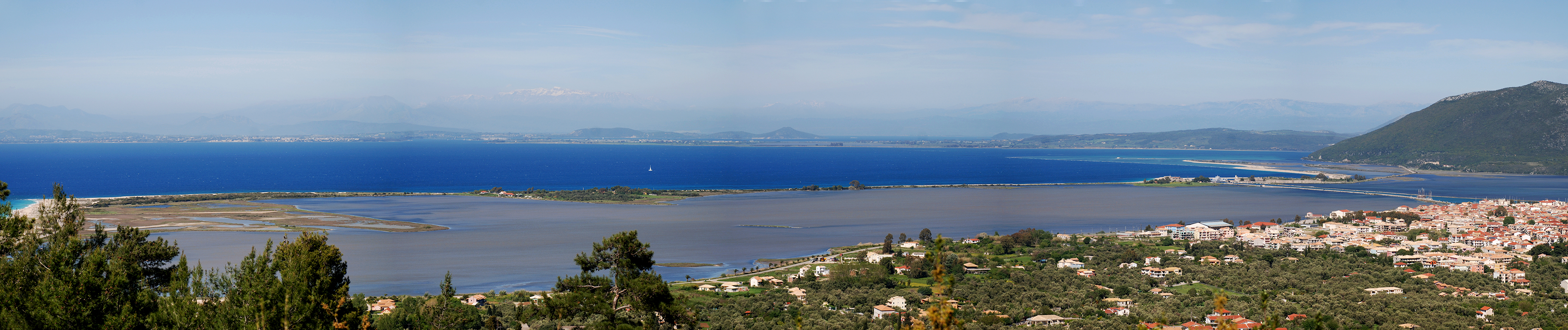 ΛΙΜΝΟΘΑΛΑΣΣΕΣ ΣΤΕΝΩΝ ΛΕΥΚΑΔΑΣ This is a photography of Natura 2000 protected area with ID GR2240001